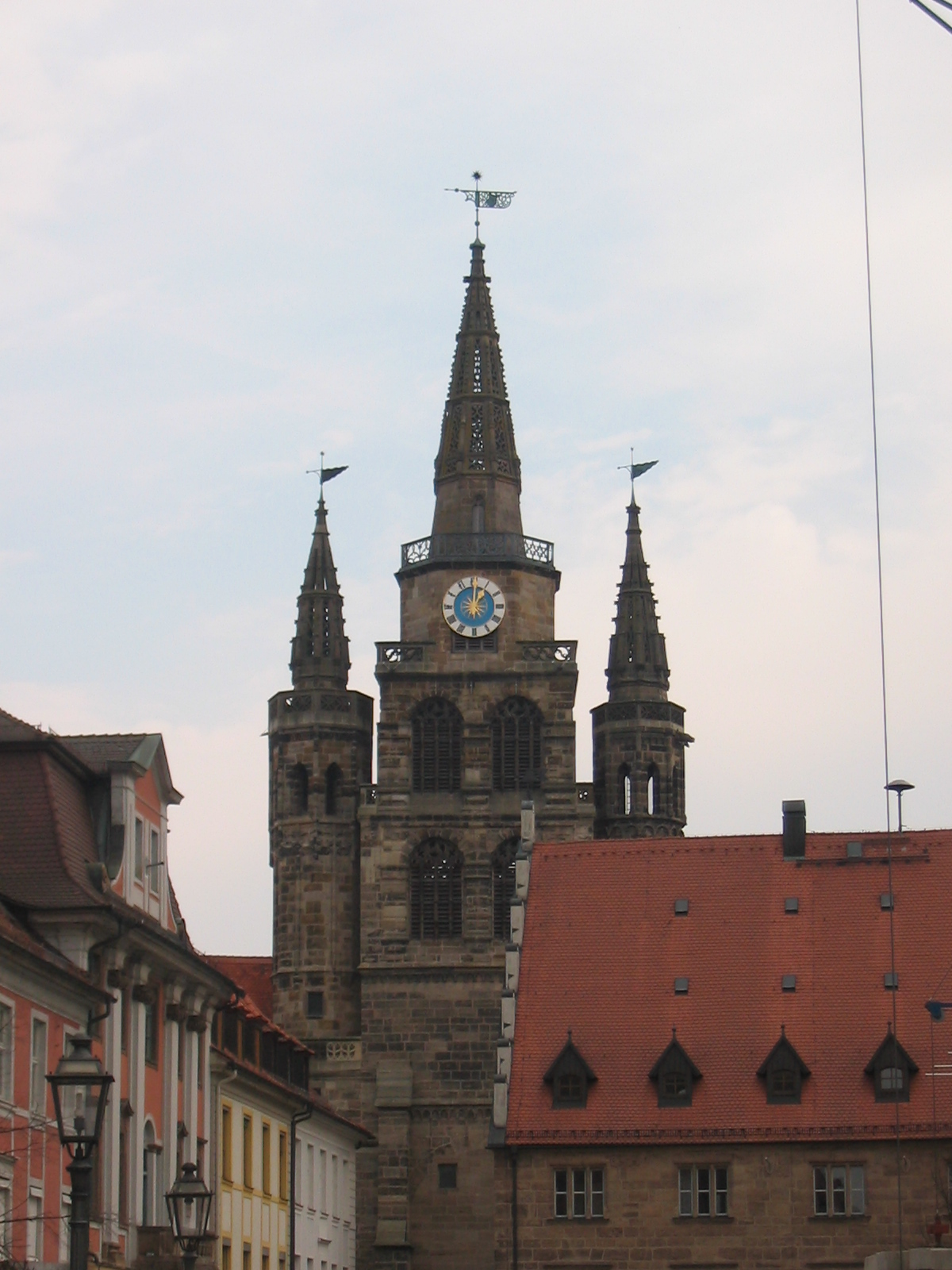 St. Gumbertus gehört zusammen mit ihrer Nachbarkirche St. Johannis zu den zentralen Innenstadtkirchen von Ansbach in Bayern.